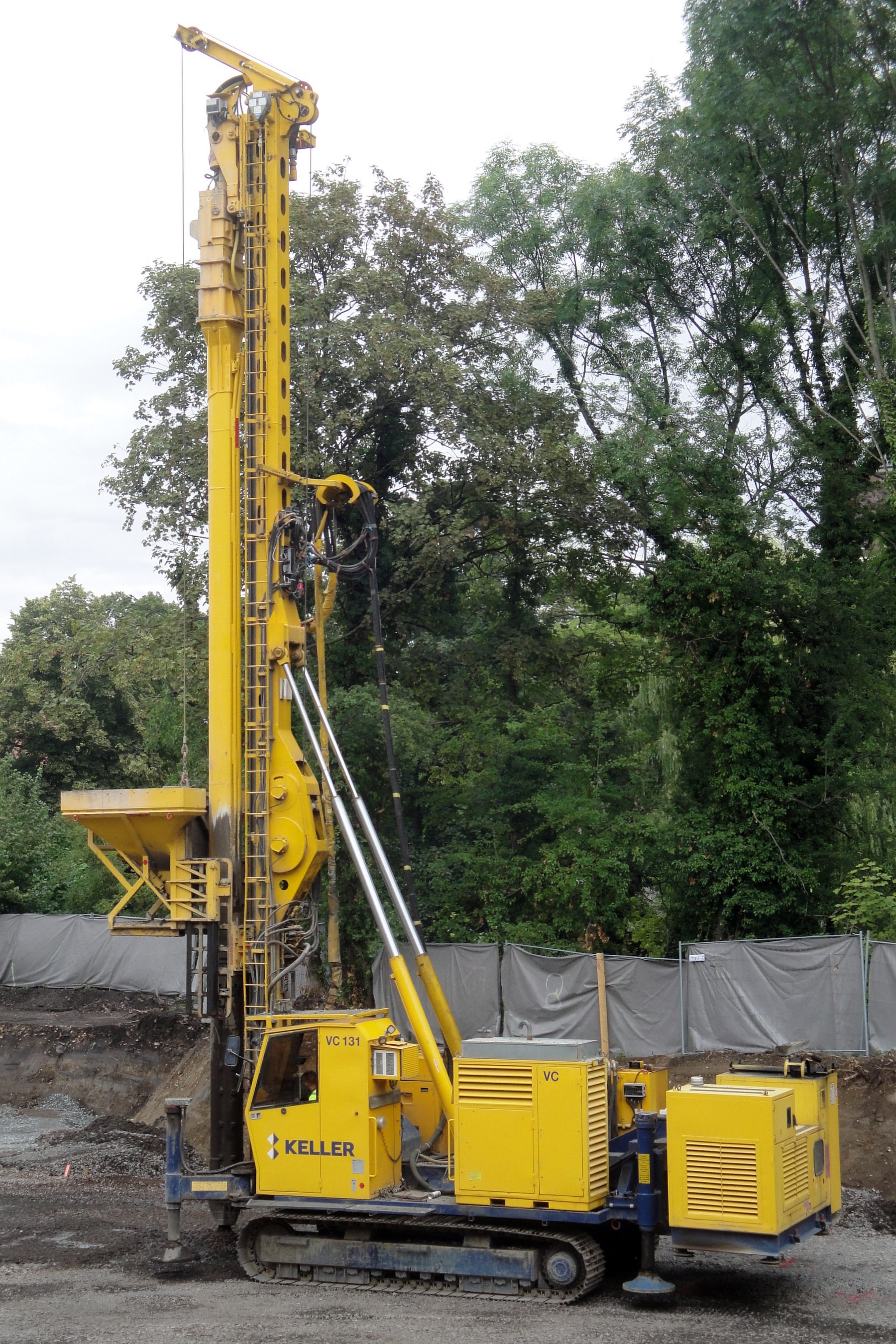 VC 131, Keller Grundbau, Rüttelstopfverdichtung in Leipzig